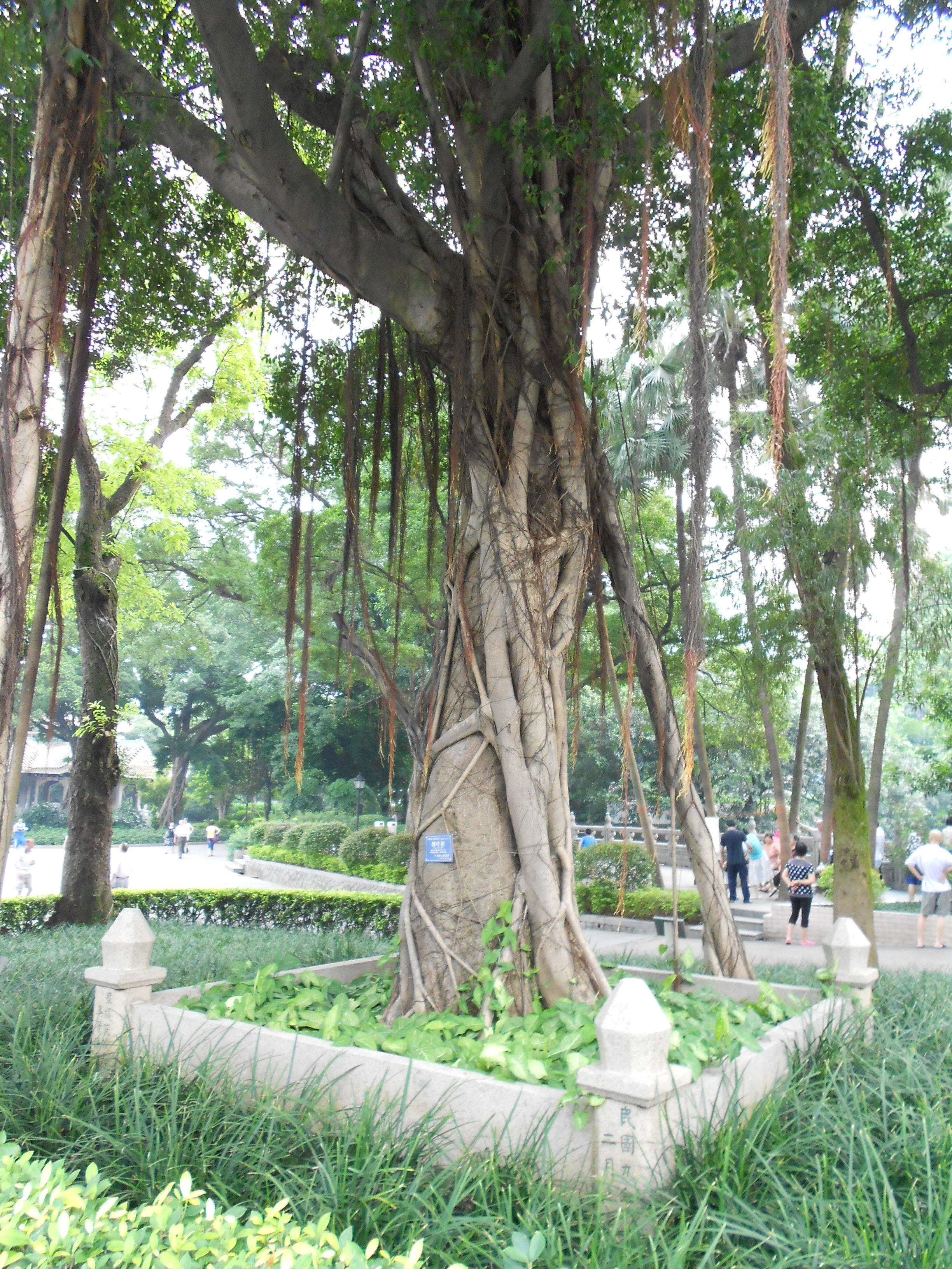 眾議院院長吳景濂手植樹。